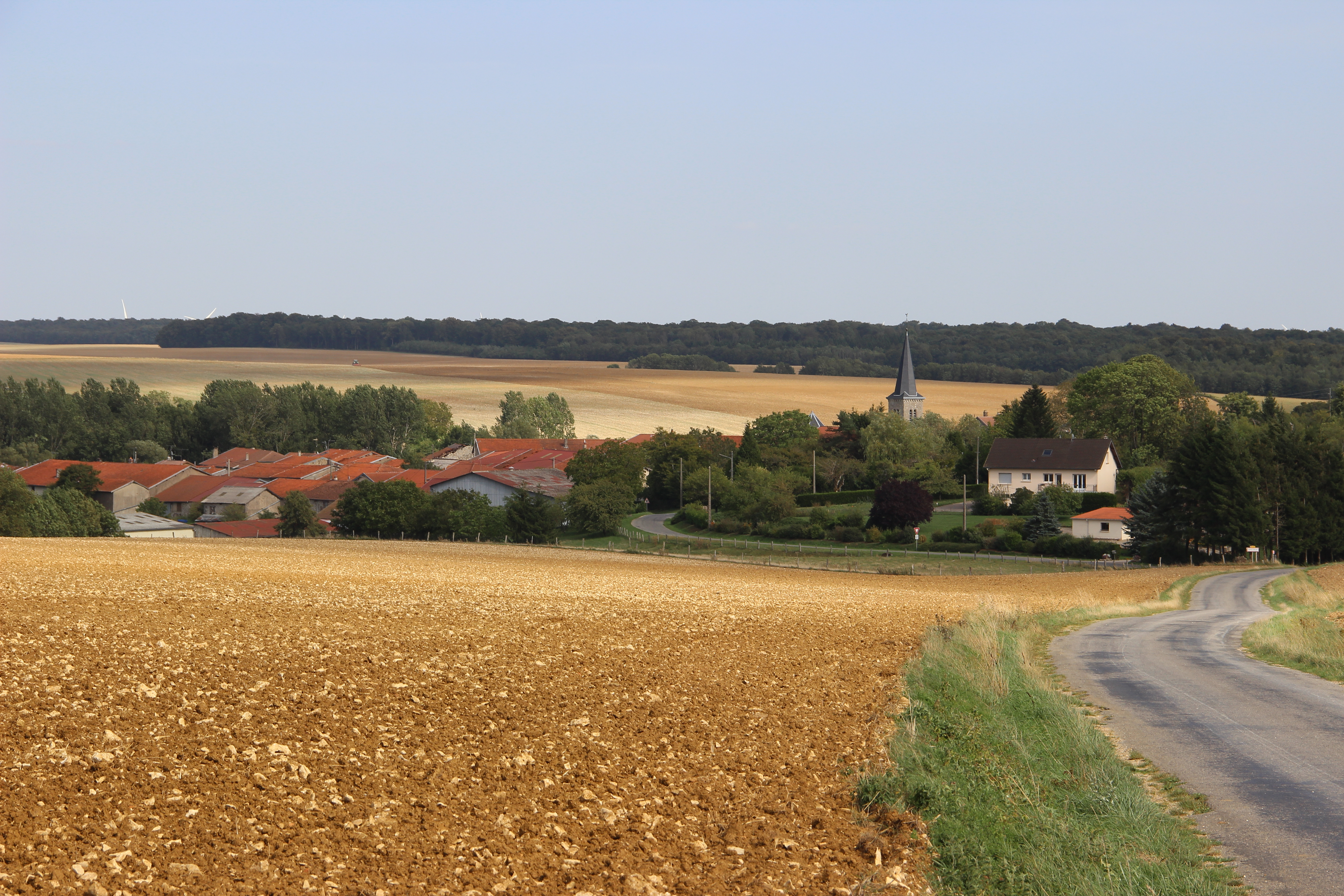 Aperçu du village